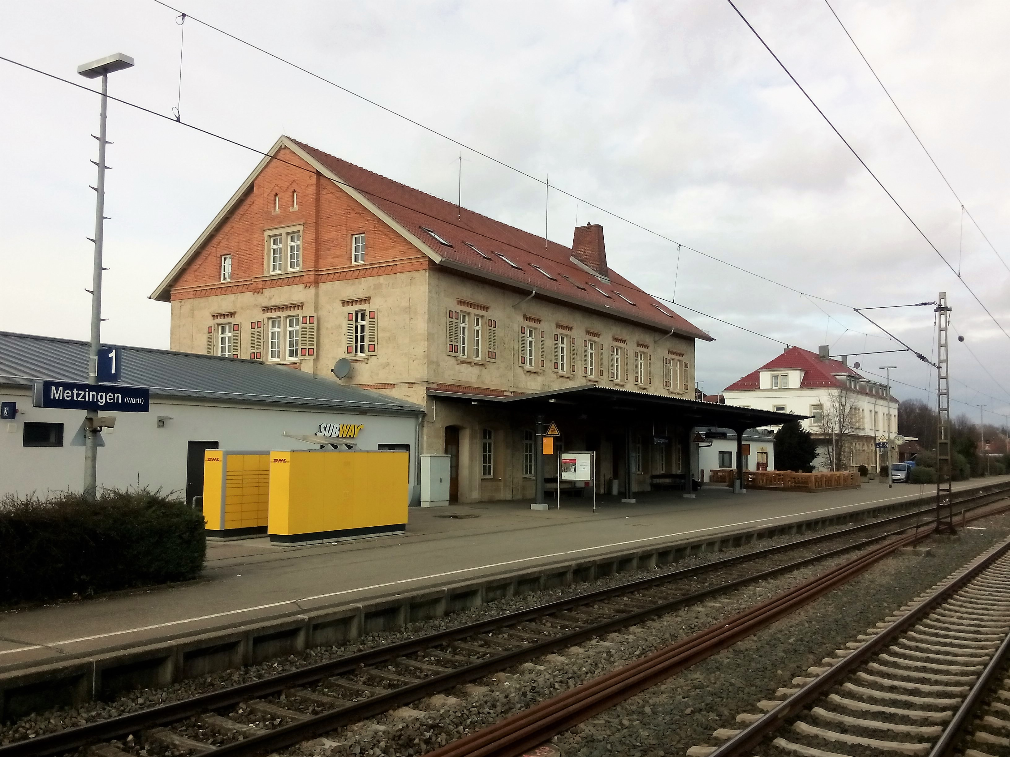 Von Gleis 2 aus gesehen